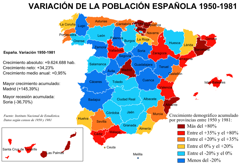 Mapa de España con las variaciones de población por provincias en el periodo 1950-1975, según los censos correspondientes del Instituto Nacional de Estadística.